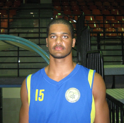 Josh Duncan in Maccabi Ashdod ג'וש דאנקן במדי מכבי אשדוד (2010)